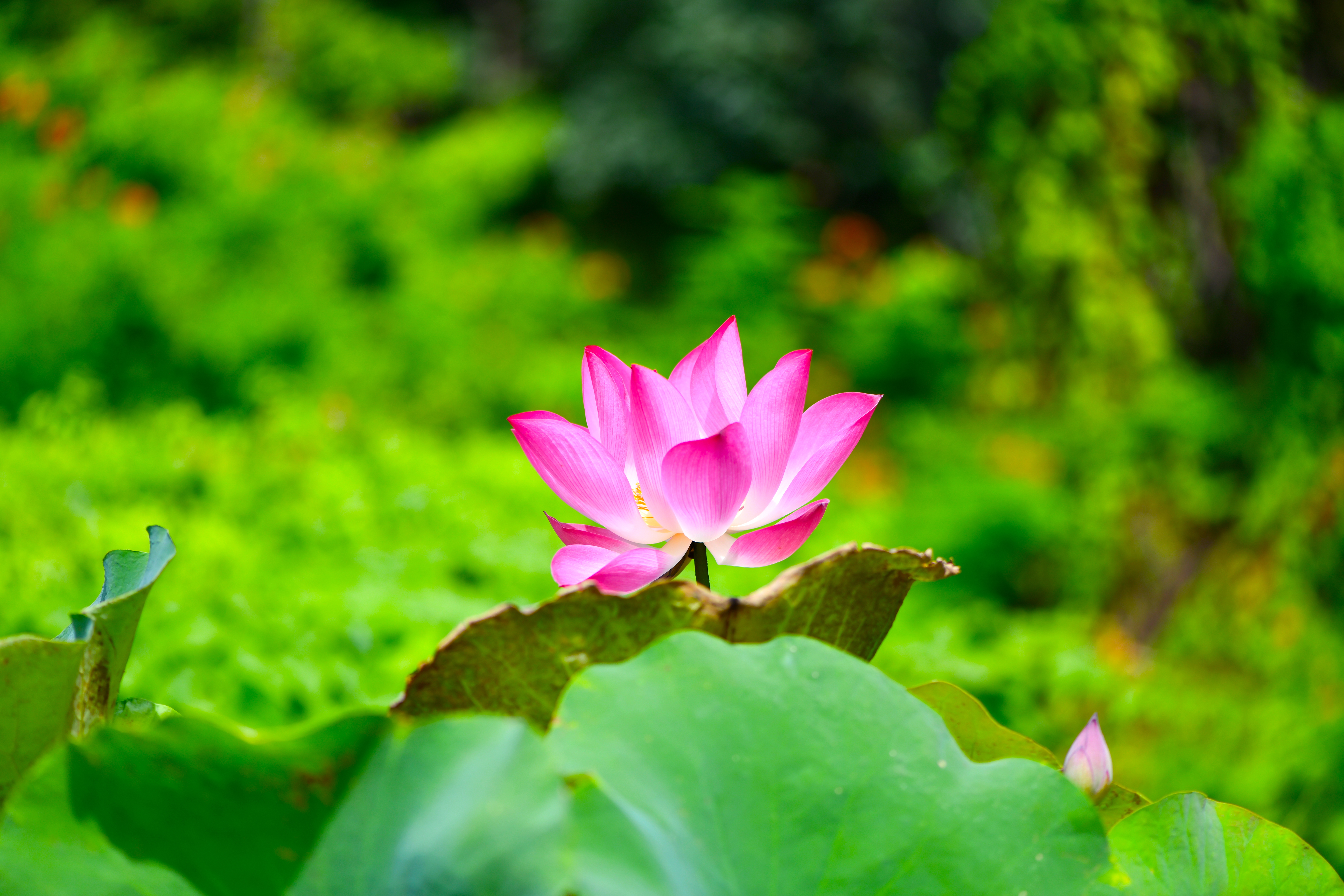 อุทยานแห่งชาติเขาใหญ่